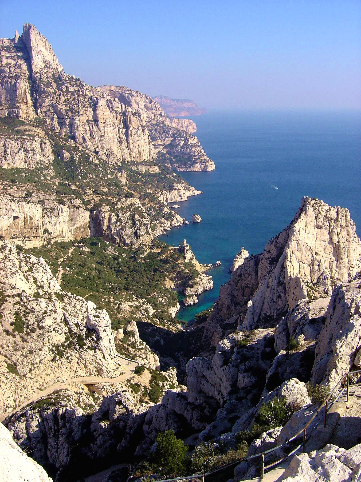 Calanques de Marseille (Sugiton vu du Belvédère)